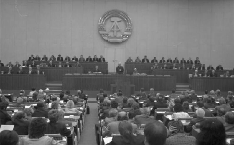 Berlin, Volkskammertagung ADN-ZB/Mittelstädt/13.11.89/Berlin: Volkskammer-Tagung Die 11. Tagung der Volkskammer der DDR begann im Plenarsaal des Palastes der Republik. Der zweitälteste Abgeordnete, Hans Jendretzky, leitete im Auftrag aller Fraktionen und des demokratischen Blocks die Tagung bis zur erfolgten Wahl des Parlamentspräsidenten. Information added by Wikimedia users.